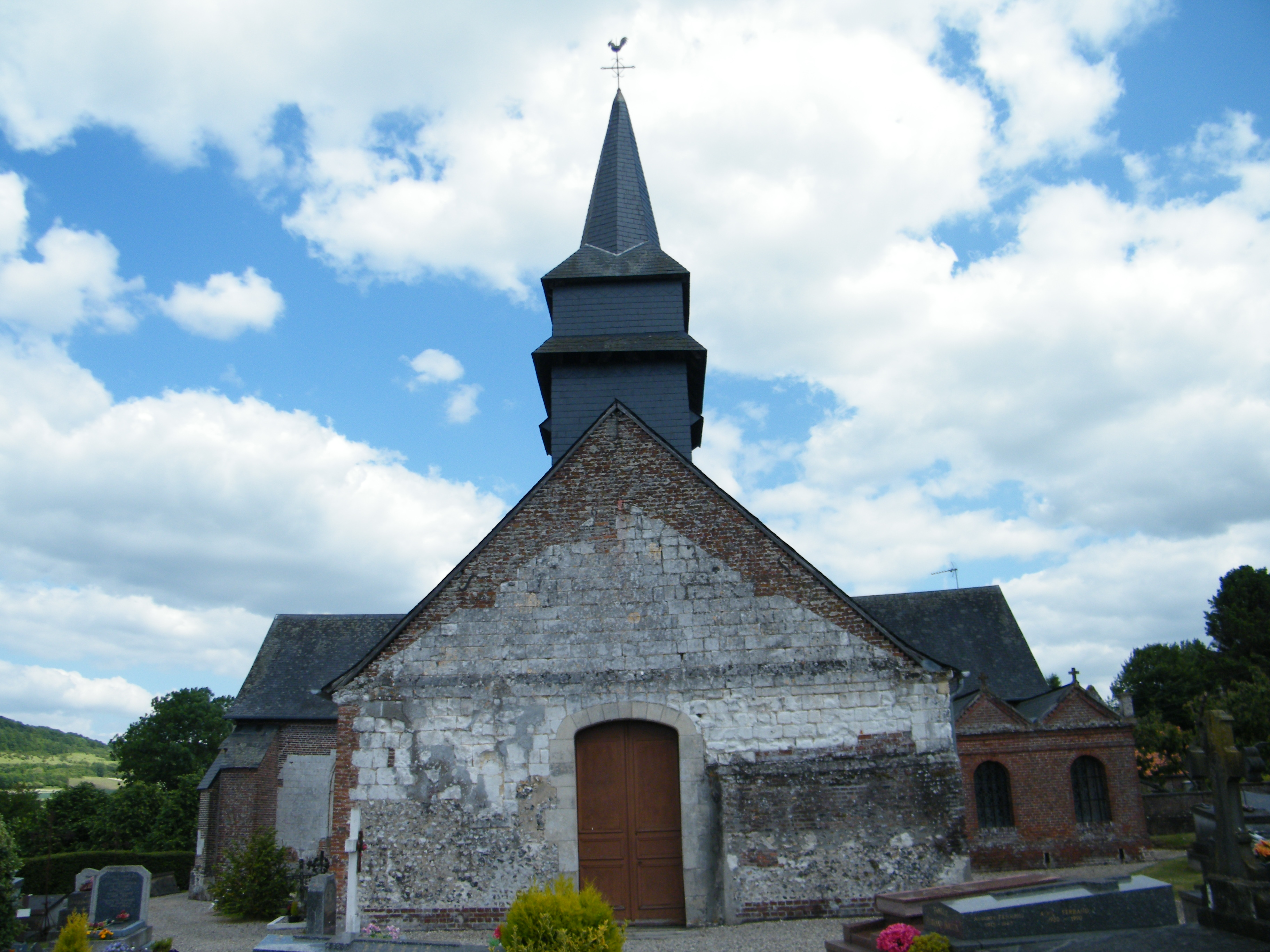 L'église de Cuverville.